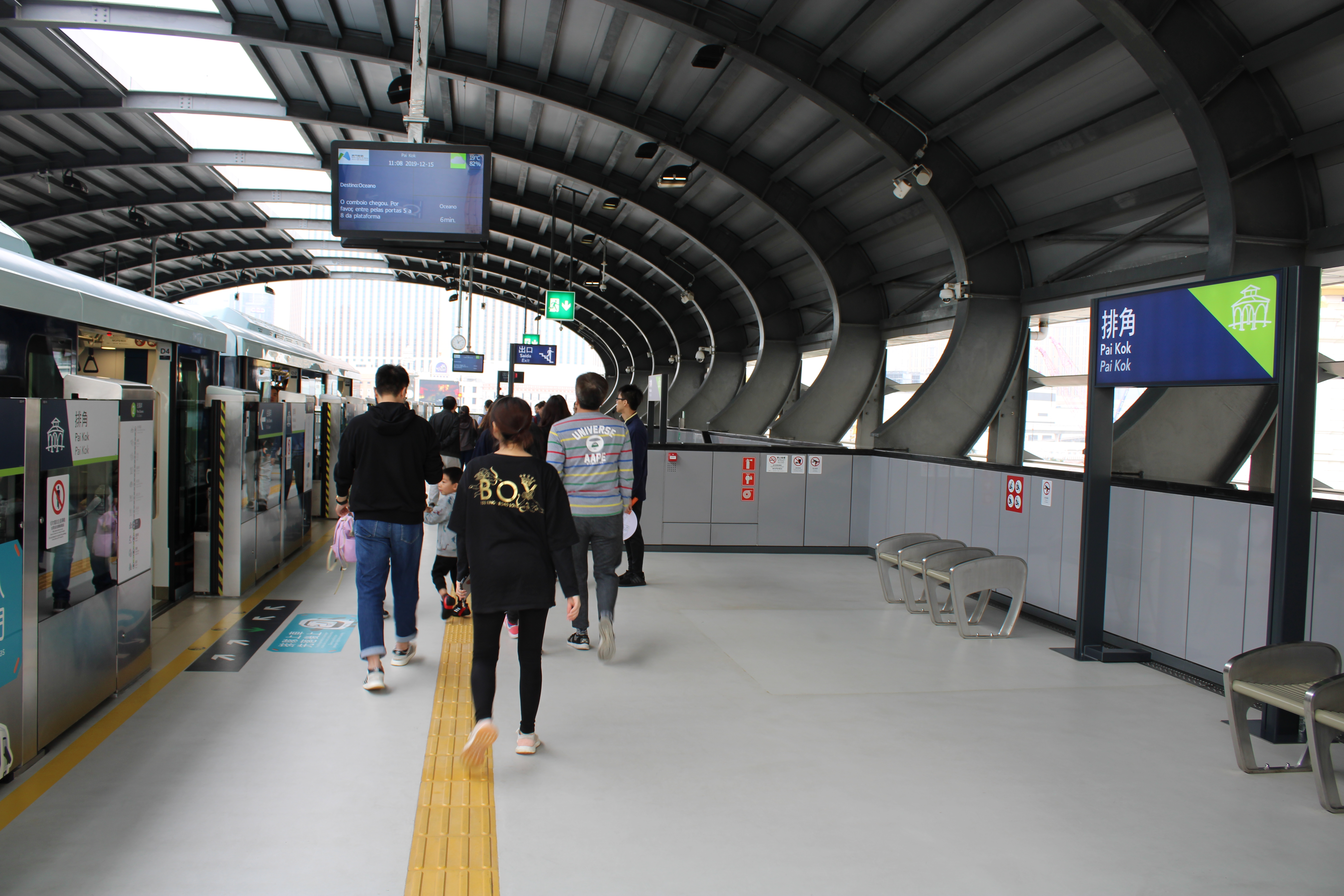 2019年12月的澳門輕軌氹仔線排角站月臺。